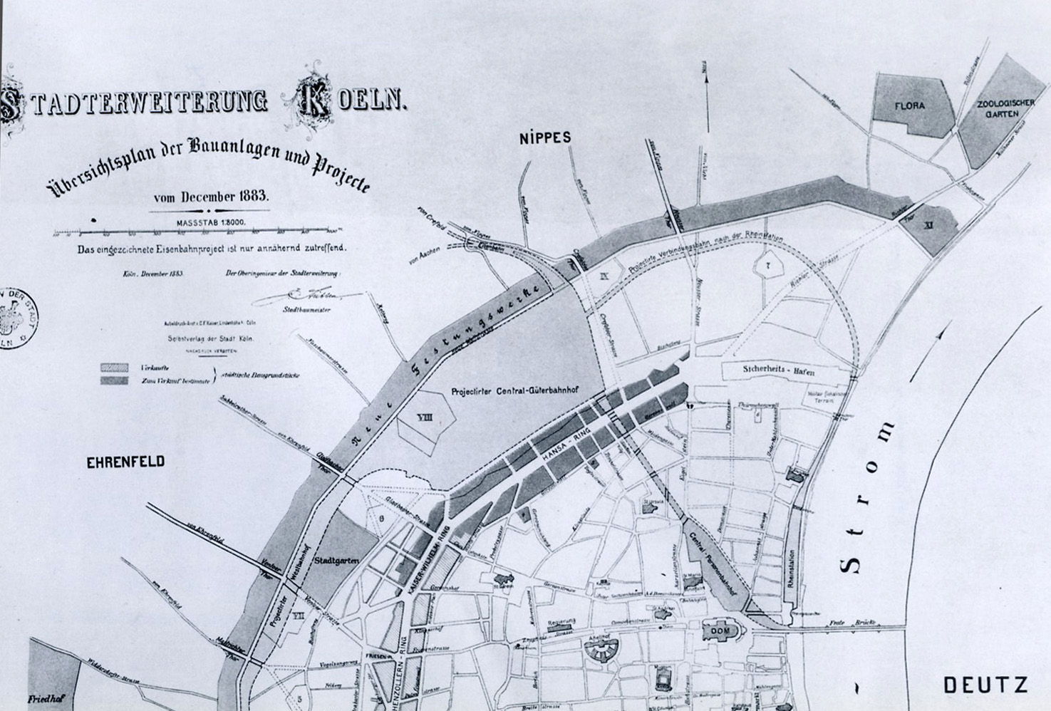 Übersichtsplan zur Kölner Stadterweiterung von Stadtbaumeister J. Stübben im Jahr 1883. Ausschnitt der Karte 14, Nordstadtbereich